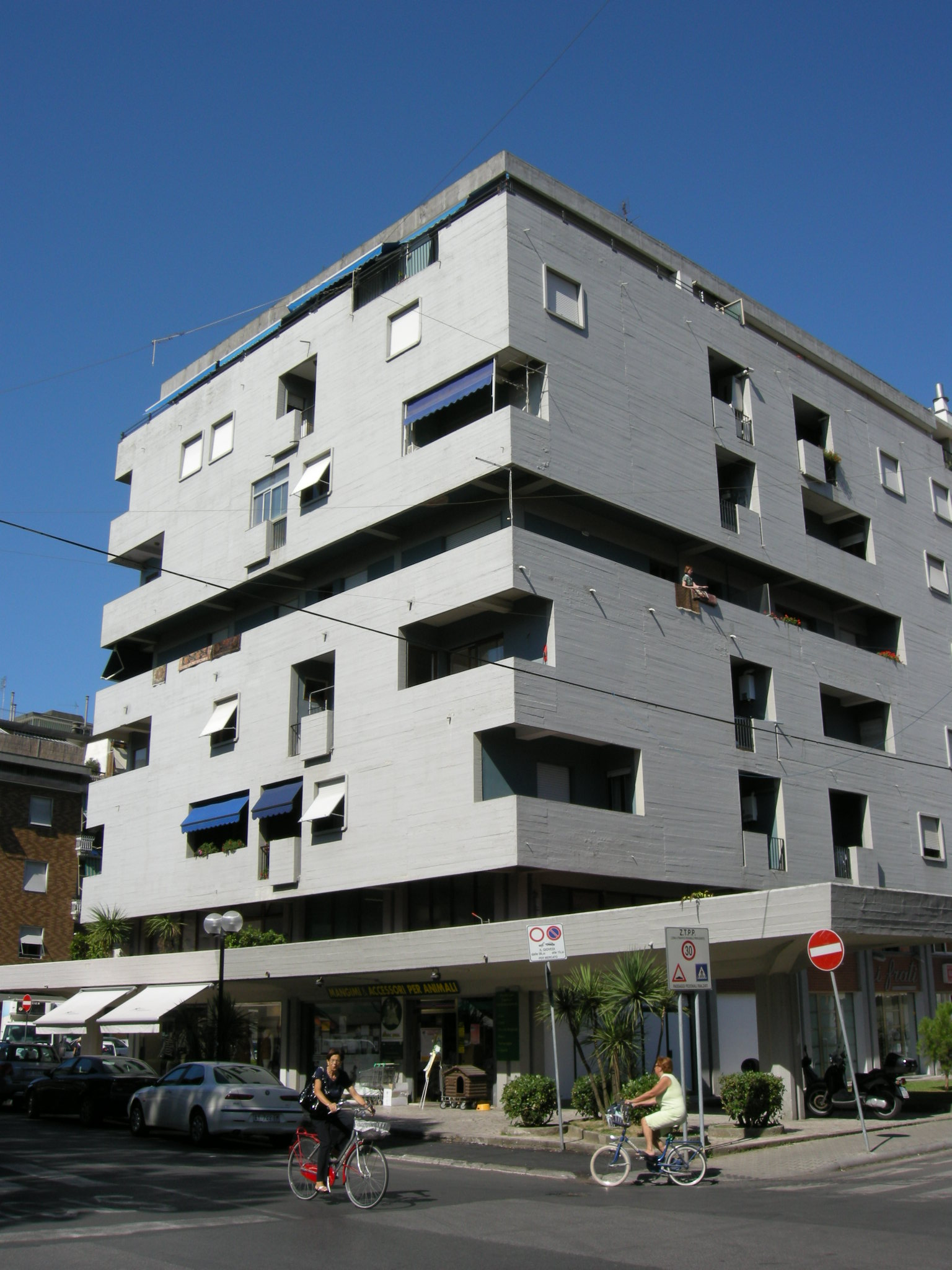 Consominio di via venezia (marina di Carrara)